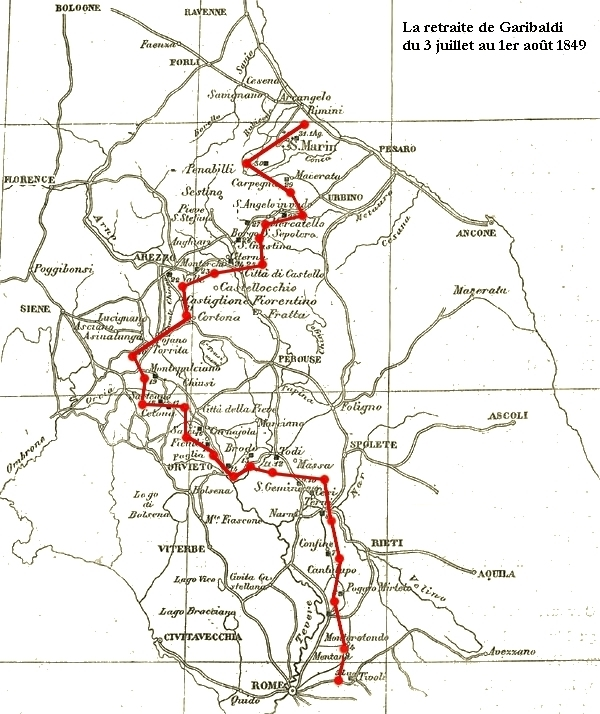 plan de la retraite de Garibaldi en 1849 après la chute de la république romaine